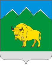 Герб Мостовского района Краснодарского края